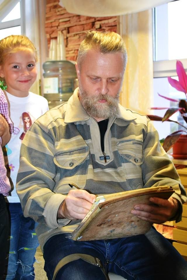 мастер-класс в Самаре